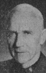 Hans Westman